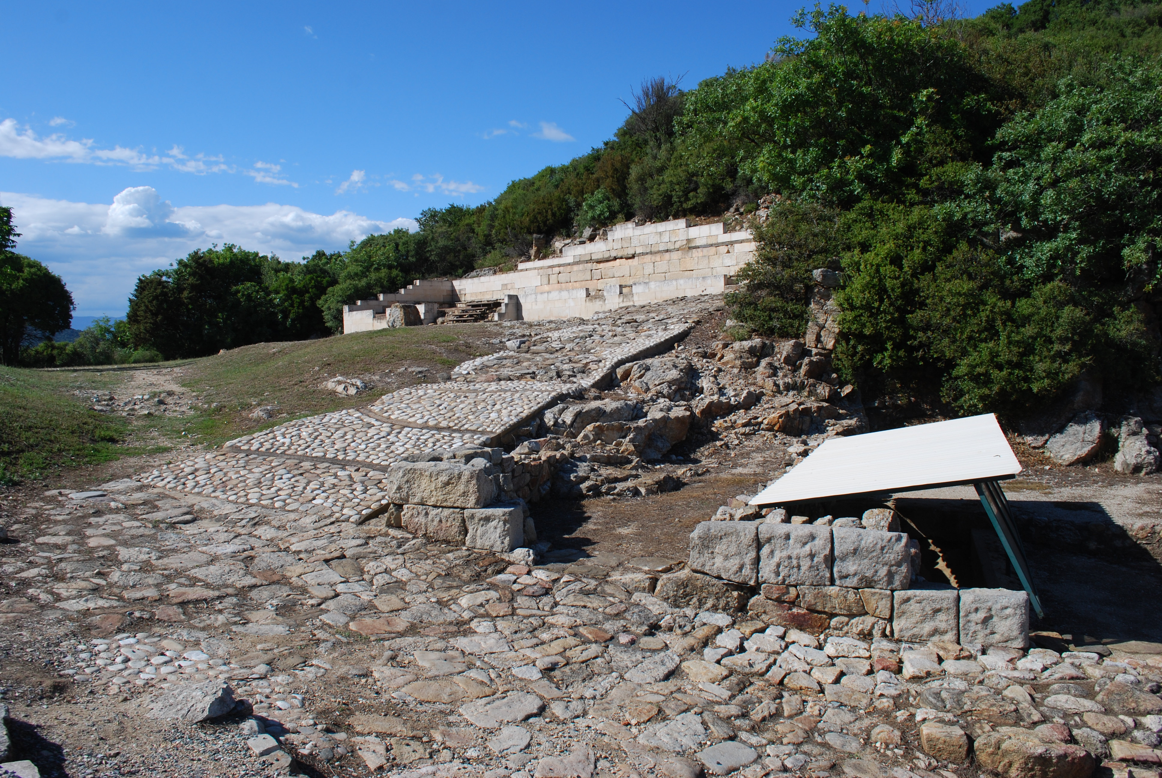 Vue du site archéologique de l'ancienne Stagire, ville natale du philosophe Aristote (Stagire, 384 av. J.-C. - Chalcis, 322 av. J.-C.).